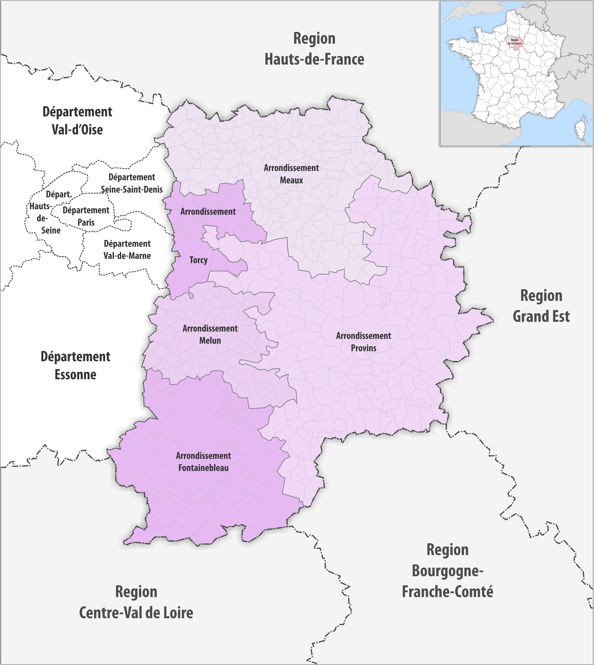 Gemeinden und Arrondissemente im Departement Seine-et-Marne